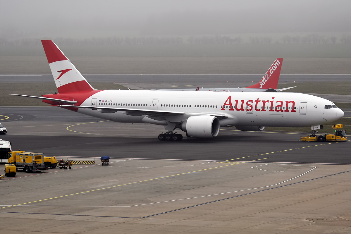 Austrian Airlines, OE-LPA, Boeing 777-2Z9 ER